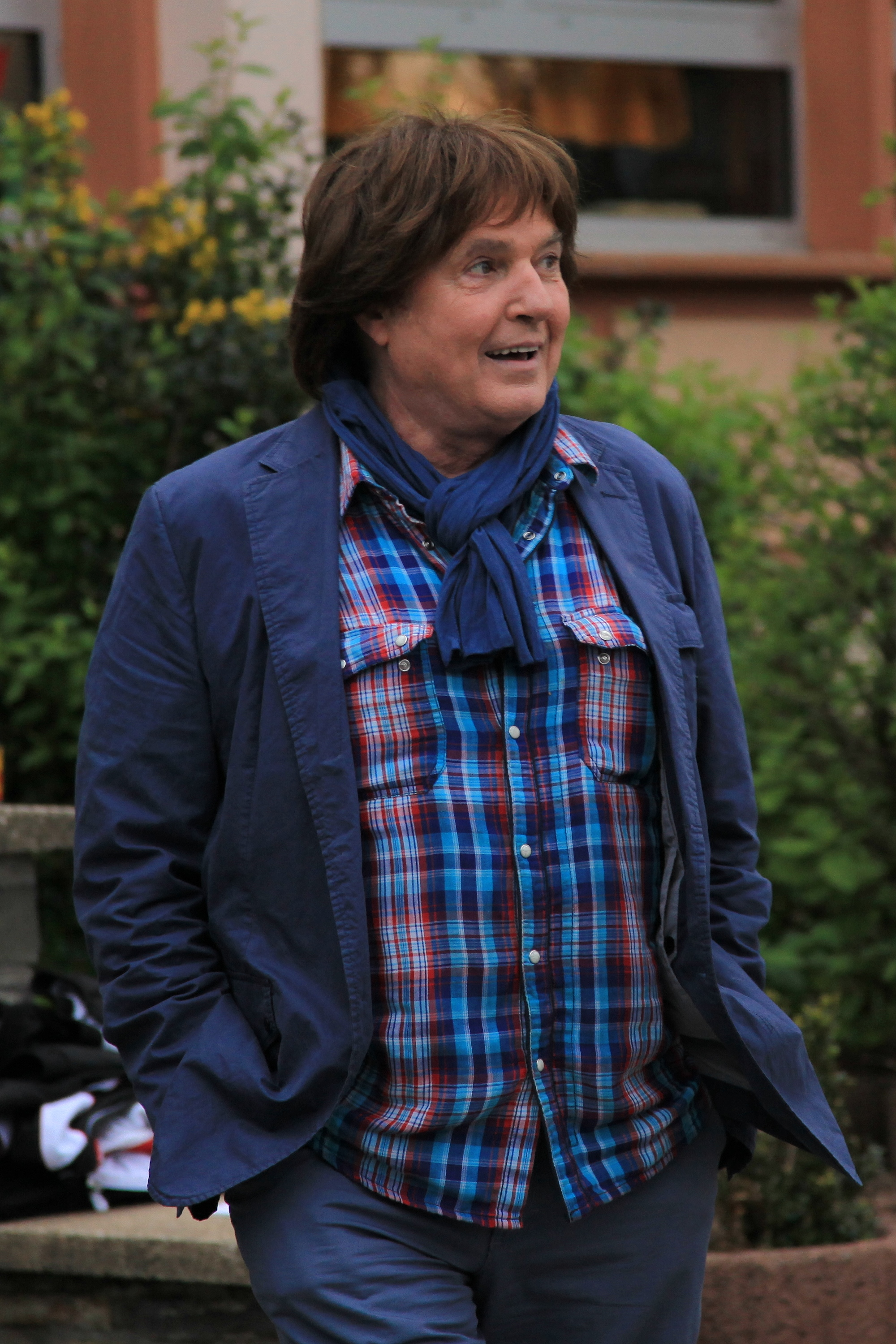 Musik-Marsch-Marathon 2012 des Musikvereins Dohrgaul in Wipperfürth